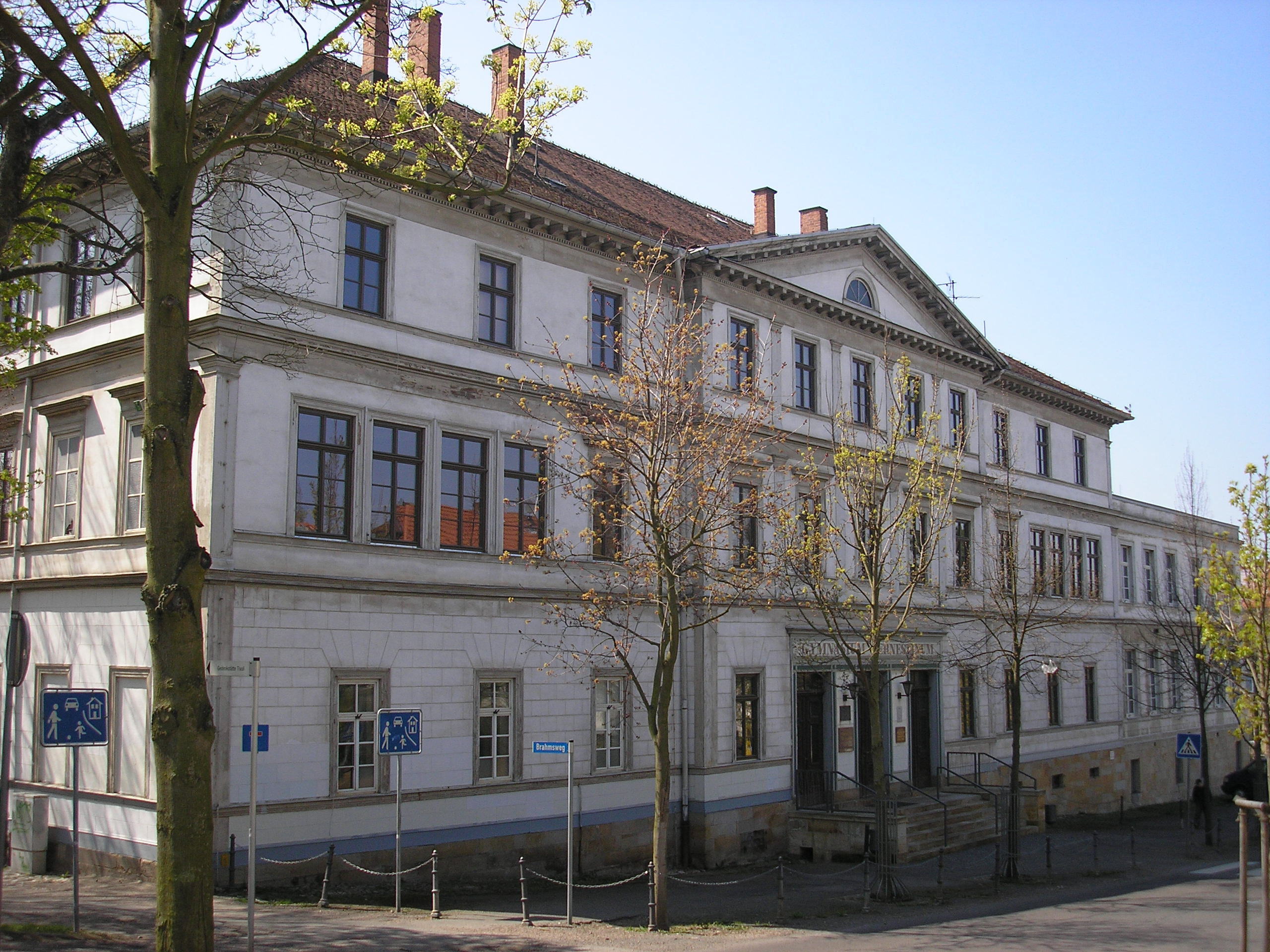 Das Ernestinum in Gotha (Thüringen).